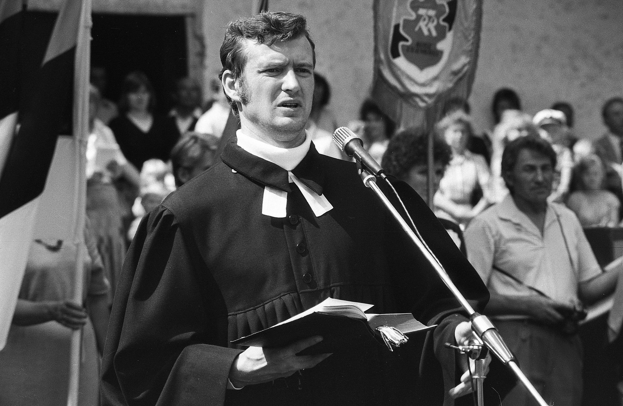 Mälestussamba taasavamine Kosel 17. juunil 1989. Kose Püha Nikolause koguduse õpetaja Randar Tasmuth.